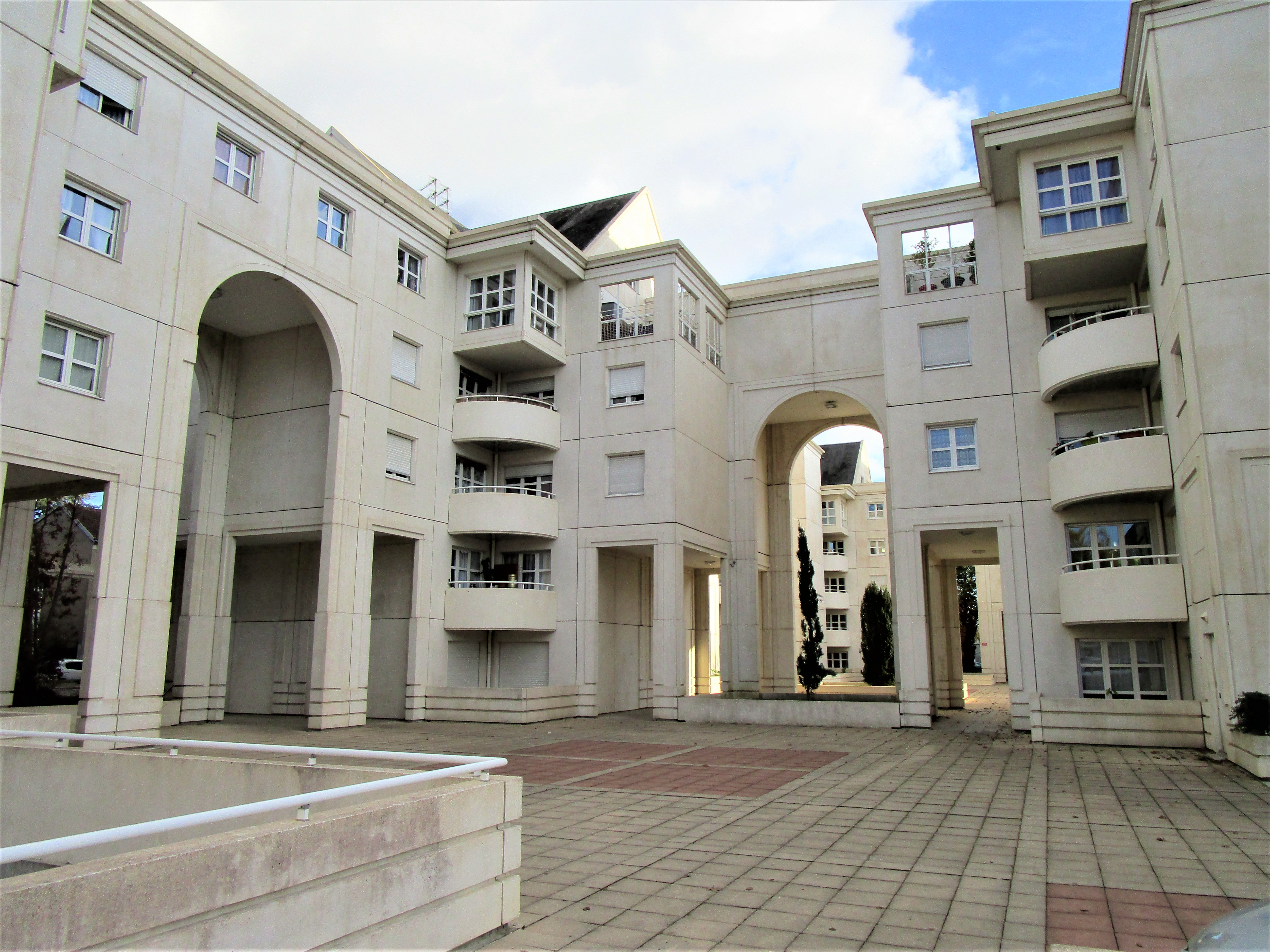 La résidence de logements sociaux Lamartine, dans le quartier du même nom, à Tours.